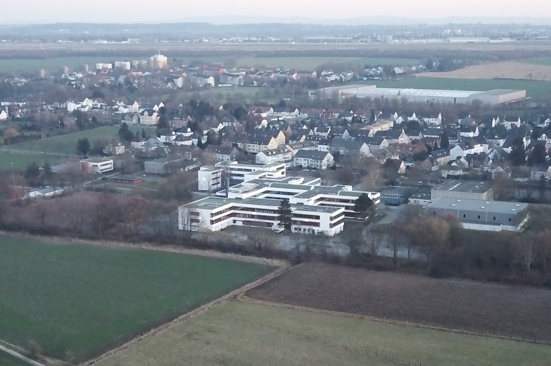 Das Immanuel Kant Gymnasium von oben.